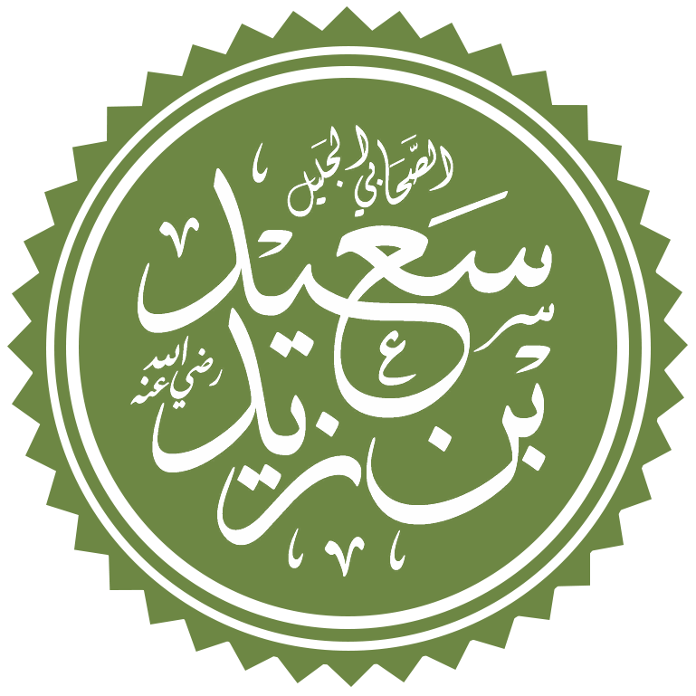 تخطيط لاسم الصحابي الجليل سعيد بن زيد رضي الله عنه